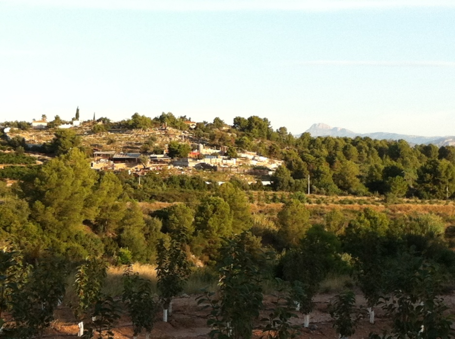 El mas de Pere